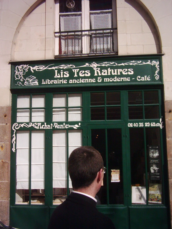 Rue Prémion à Nantes (Loire-Atlantique, France), la librairie-café "Lis tes Ratures".